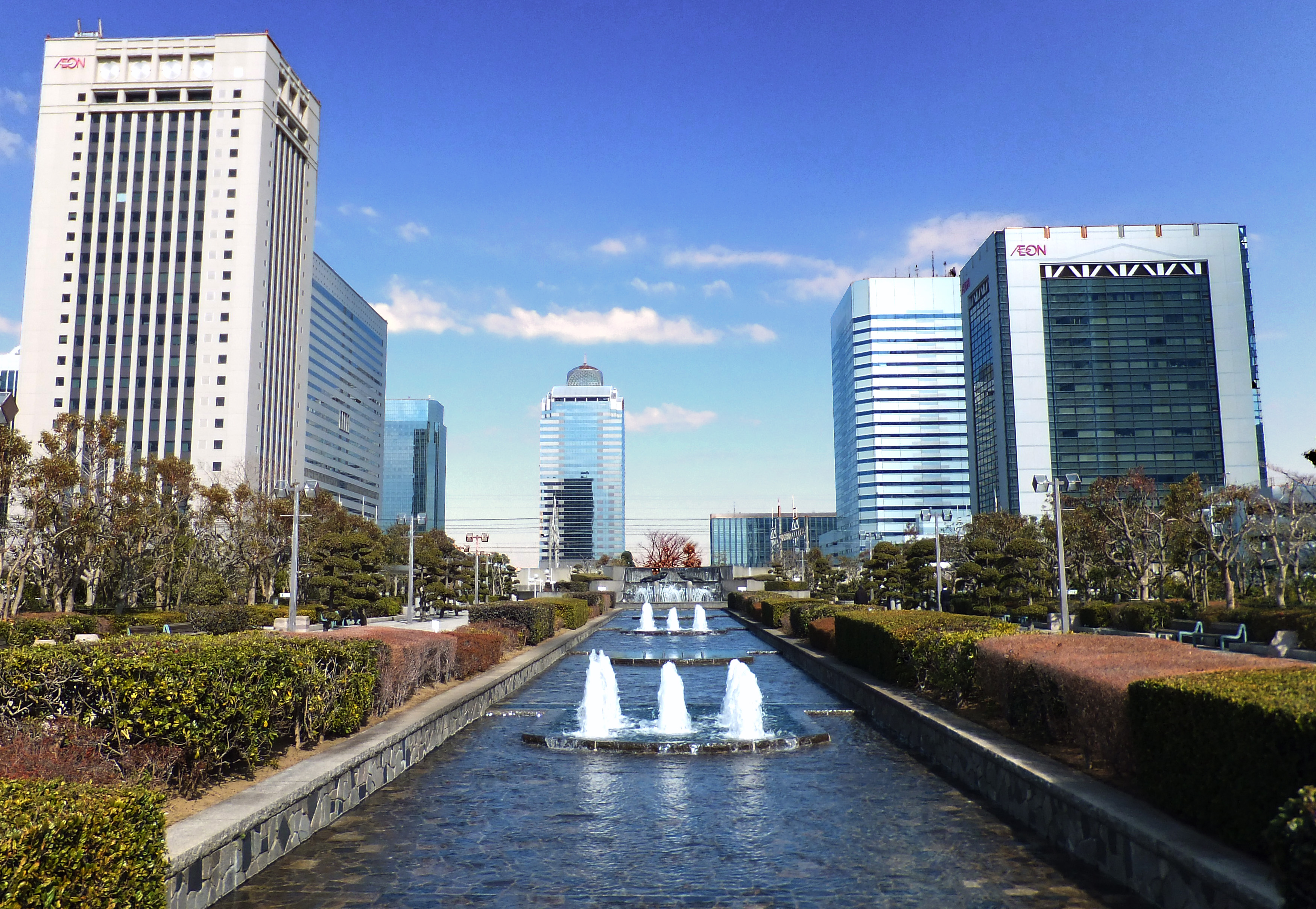 幕張メッセ前から見た幕張新都心業務研究地区